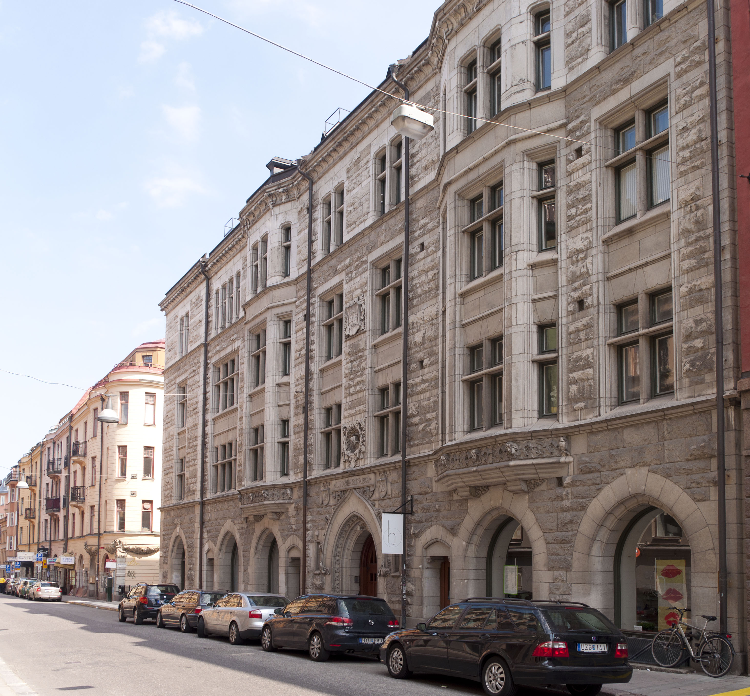 Vätan 22, Regeringsgatan 80, Snickarbacken 7 Byggnadsår 1898-1900, arkitekter B Almqvist och I G Clason, byggherre AB Sankta Birgitta, byggmästare A G Sällström.